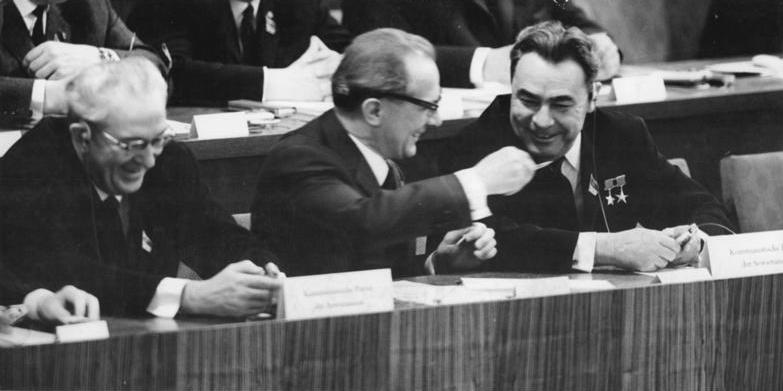 Zentralbild Gahlbeck 17.4.1967 Th-Qu VII. Parteitag der SED - 17.4.1967. Blick ins Präsidium während der Eröffnungssitzung in der Berliner Werner-Seelenbinder-Halle. Der Generalsekretär des ZK der KPdSU, Leonid Breshnew (rechts), im Gespräch mit dem Mitglied des Politbüros des ZK der SED Erich Honecker, links: Juri Andropow, Sekretär des ZK der KPdSU.